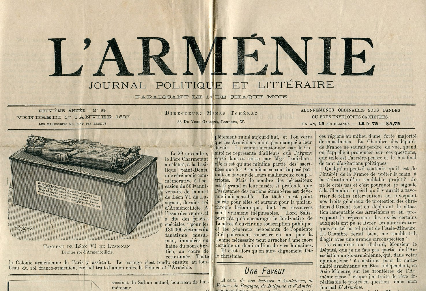 L' Armenie, 1 janvier 1897